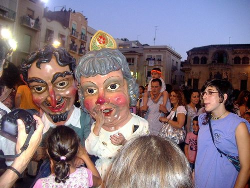 Els Nanos de Reus a la plaça del Mercadal per Sant Pere